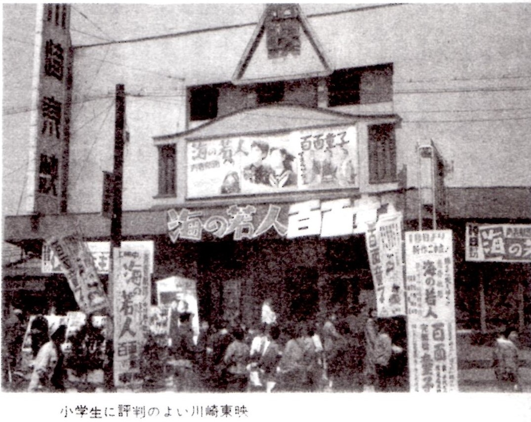 神奈川県川崎市の映画館「川崎東映」。